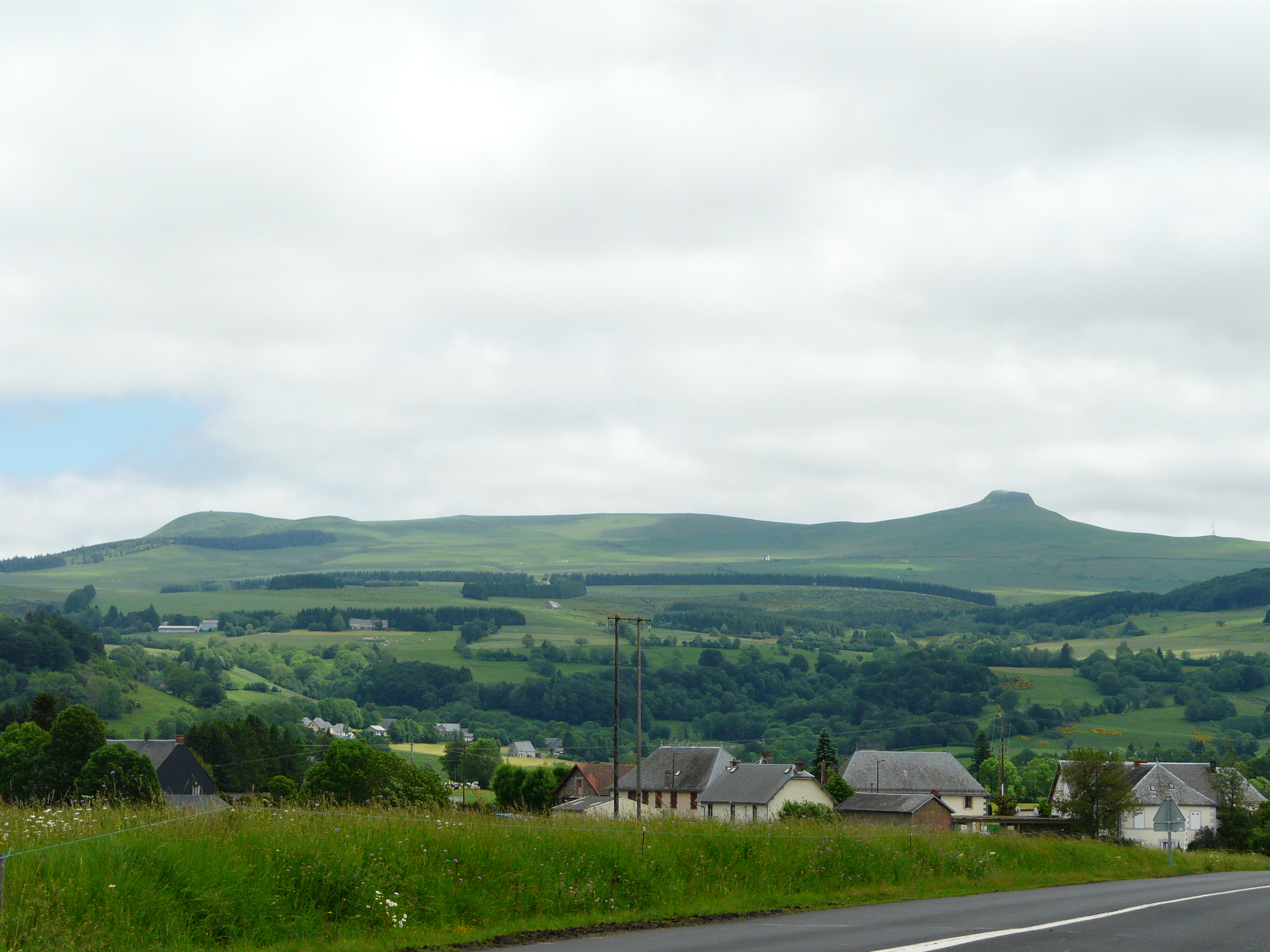 Vue vers le Puy Loup (1481 m, à gauche, commune de Perpezat) et la Banne d'Ordanche (1512 m, à droite, commune de Murat-le-Quaire). Vue prise depuis la gare de Laqueuille, Saint-Julien-Puy-Lavèze, Puy-de-Dôme, France.